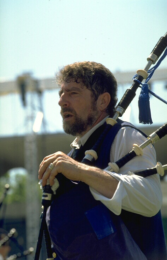 Erwan Ropars du Bagad Kemper lors de l'épreuve d'été du 49e championnat national des bagadoù, organisé dans le cadre du festival interceltique de Lorient 1998.